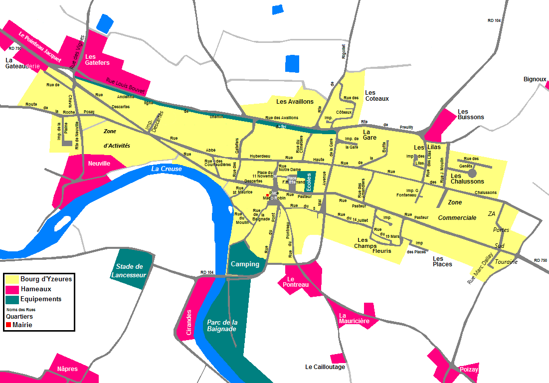 Bourg yzeures 2019